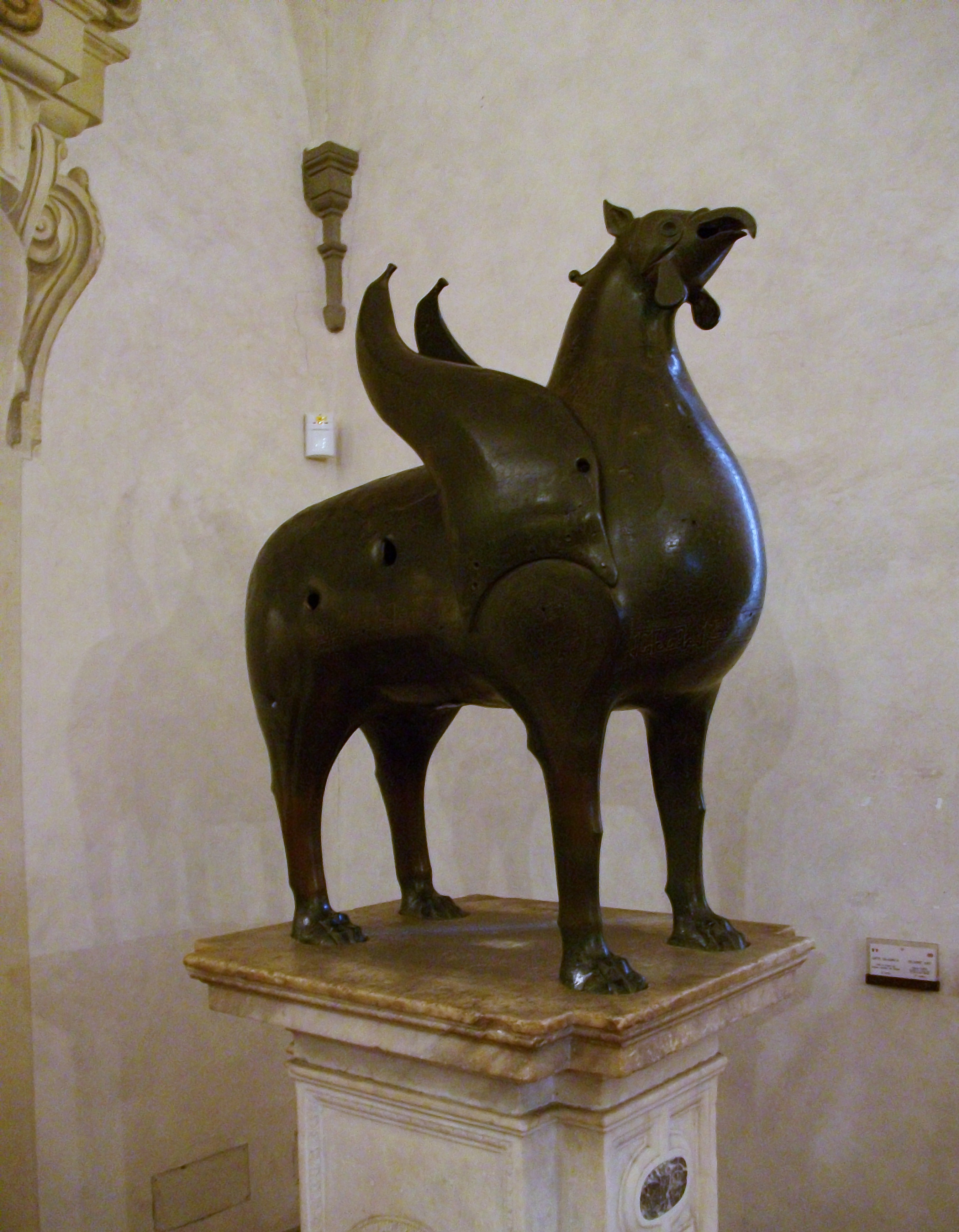 Griu islàmic, Museo dell'Opera del Duomo, Pisa.